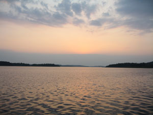 bryggan wik